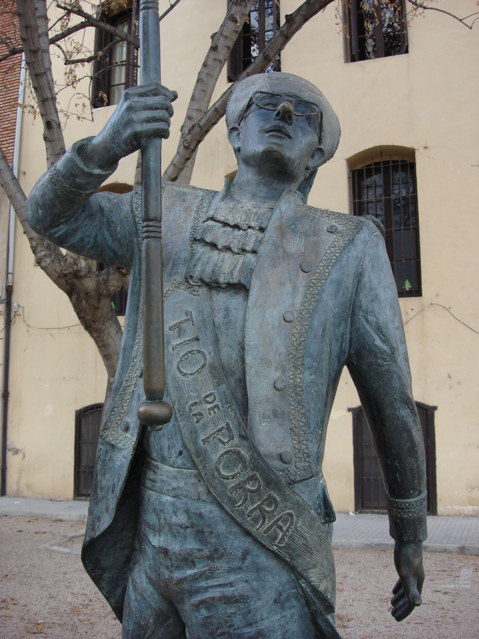 El tio de la Porra al passeig de gandia